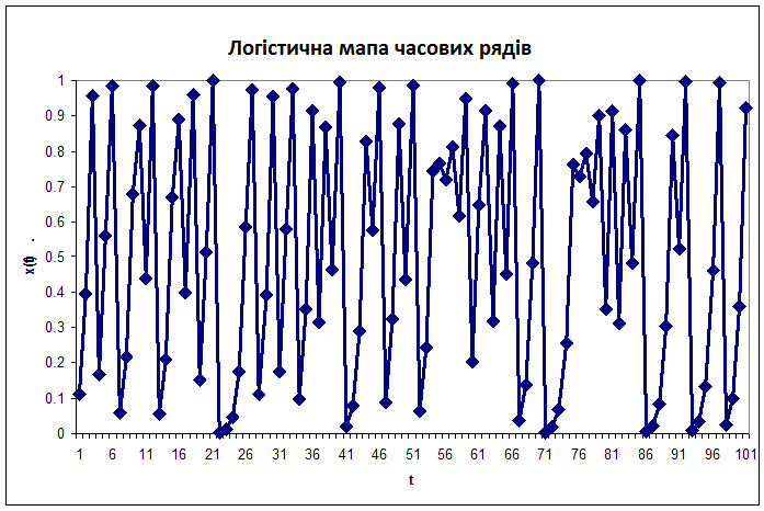 графік